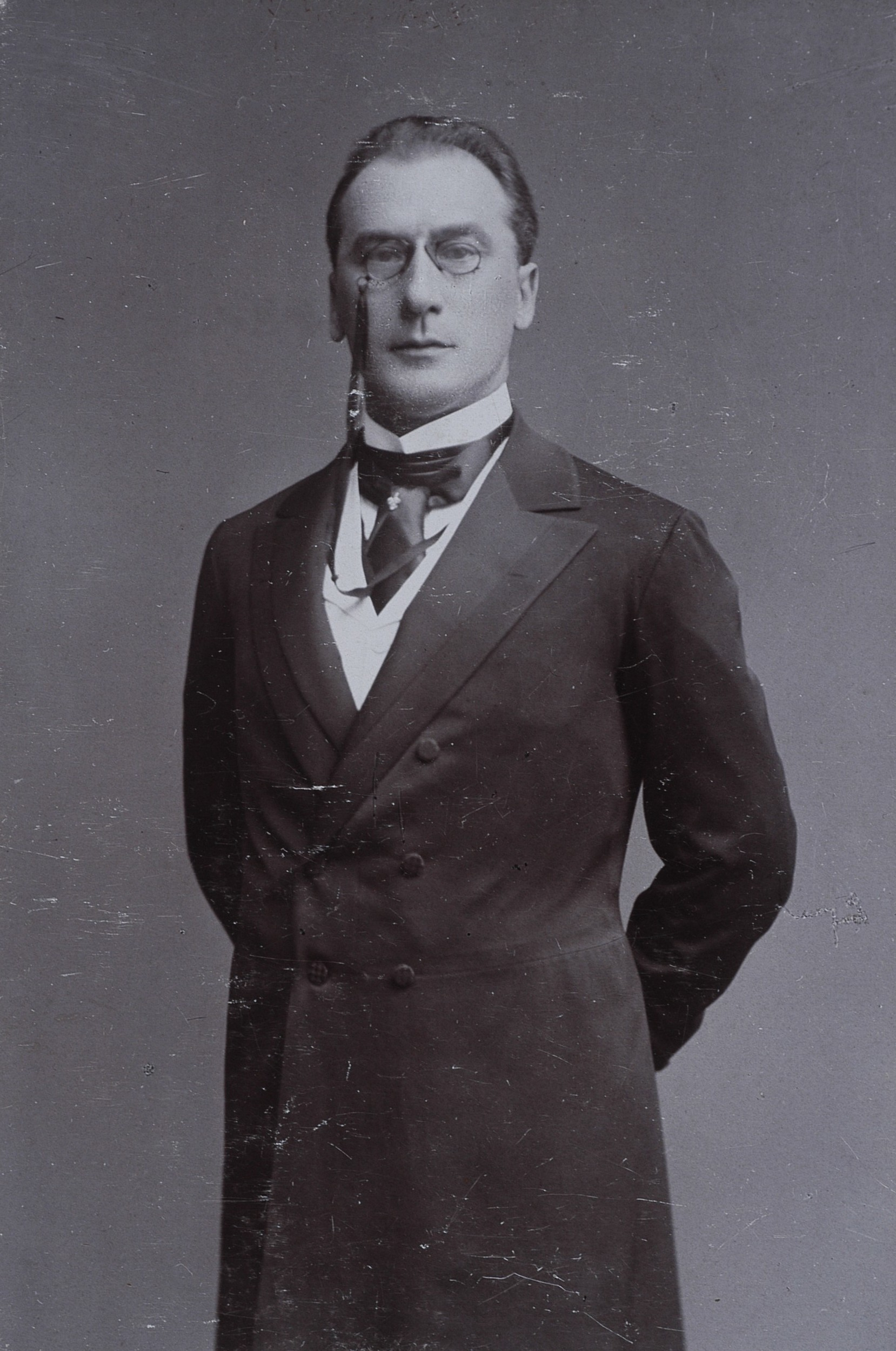 Władysław Florjański, ok. 1900 r.